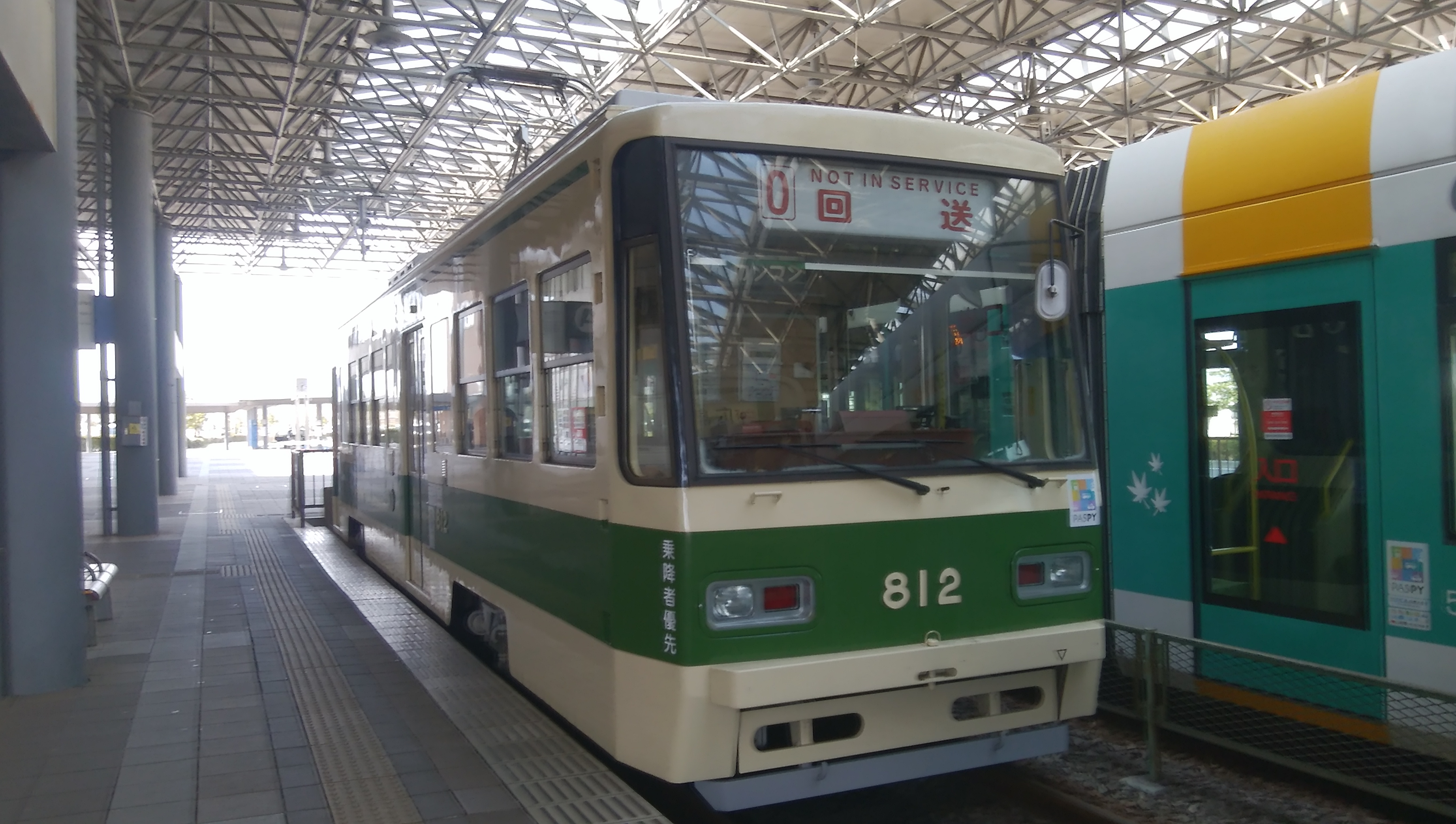 広島港Aホームに停車中の812号